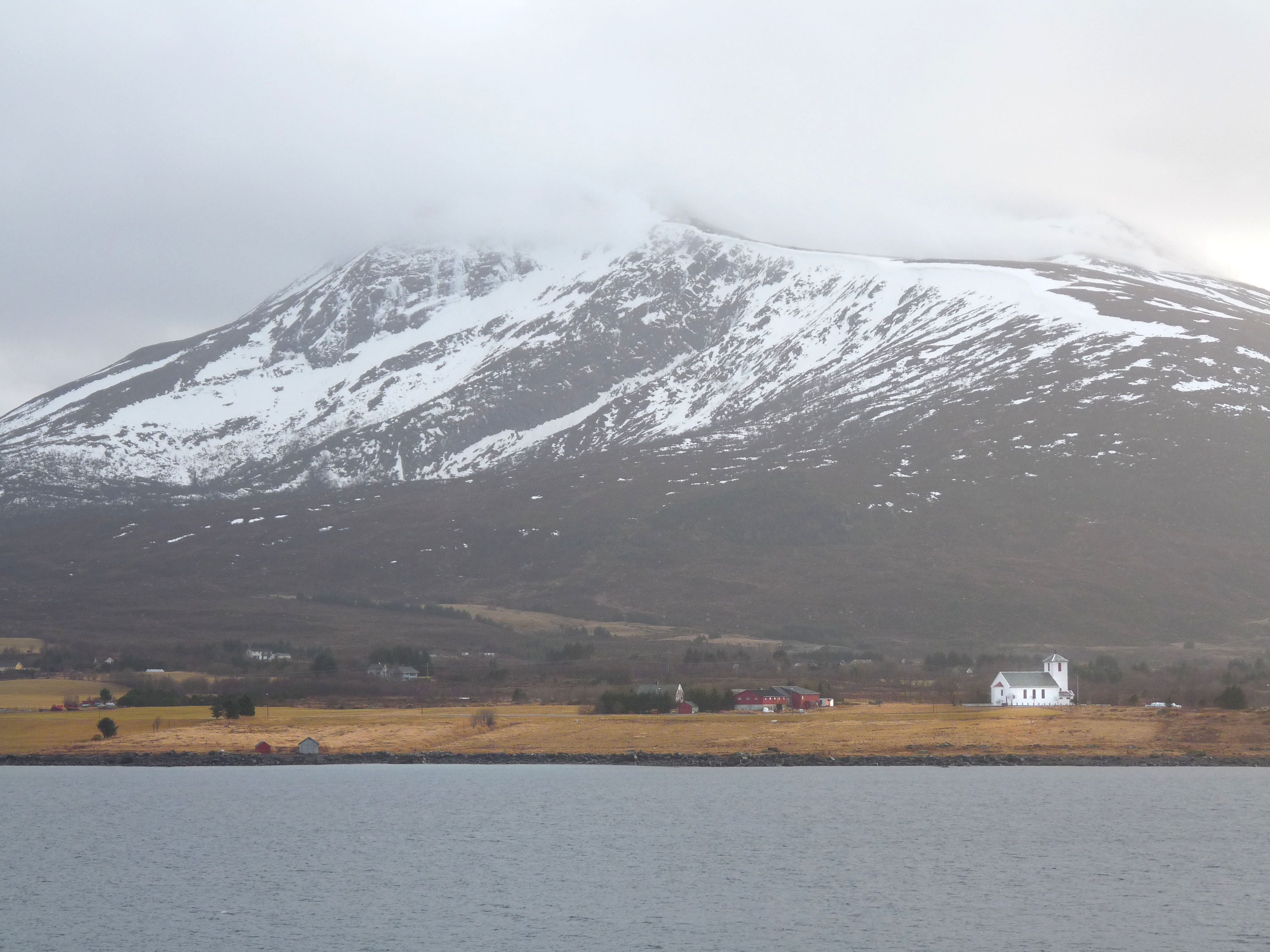 Gamlemsveten og Hildre kirke